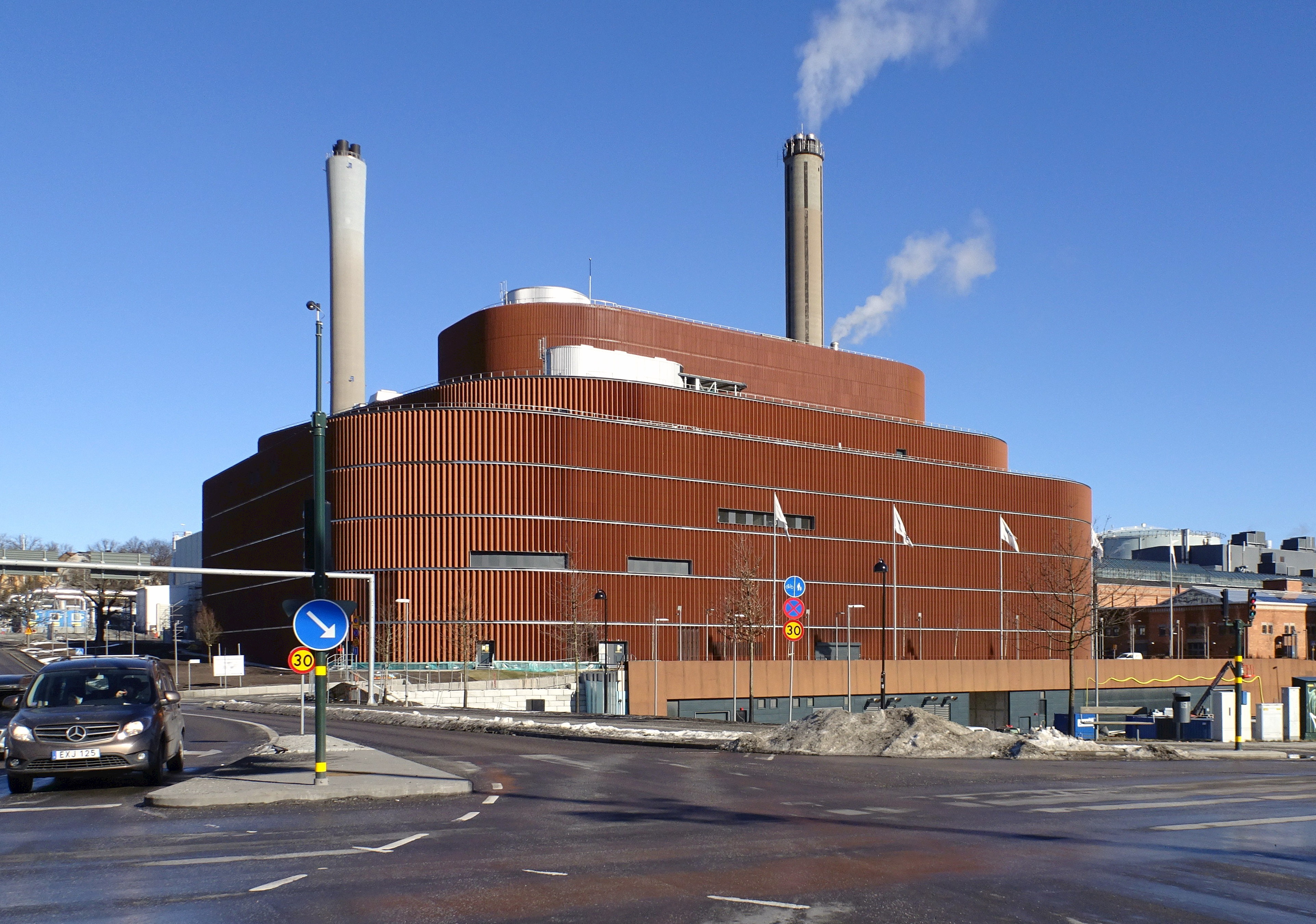 Fortums nya biobränsle-kraftvärmeverk i Hjorthagen